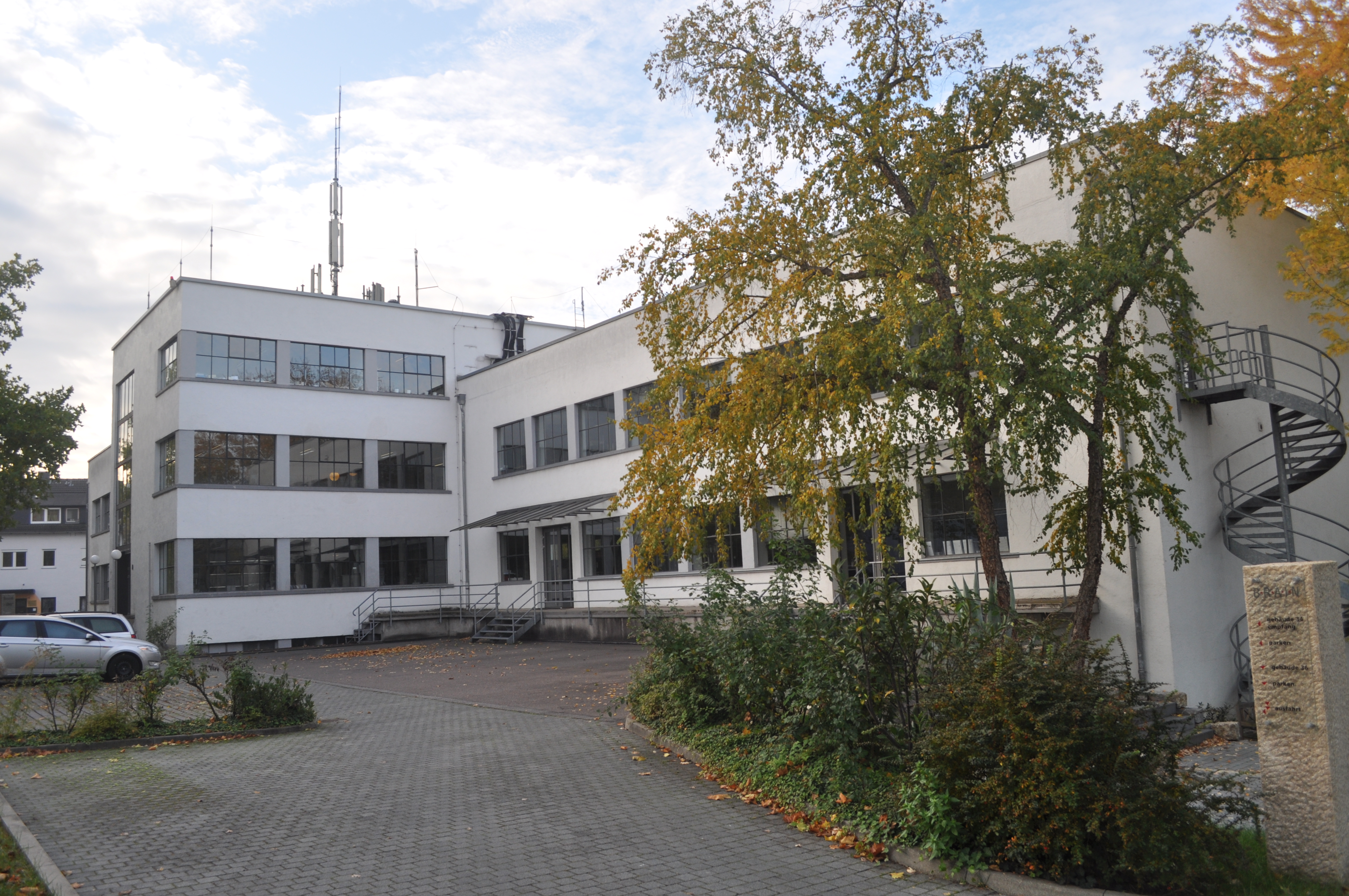 Die denkmalgeschützten ehemaligen Fissan-Werke. Das Haus im Bauhaus-Stil wurde 1928 durch Georg Fehleisen erbaut.